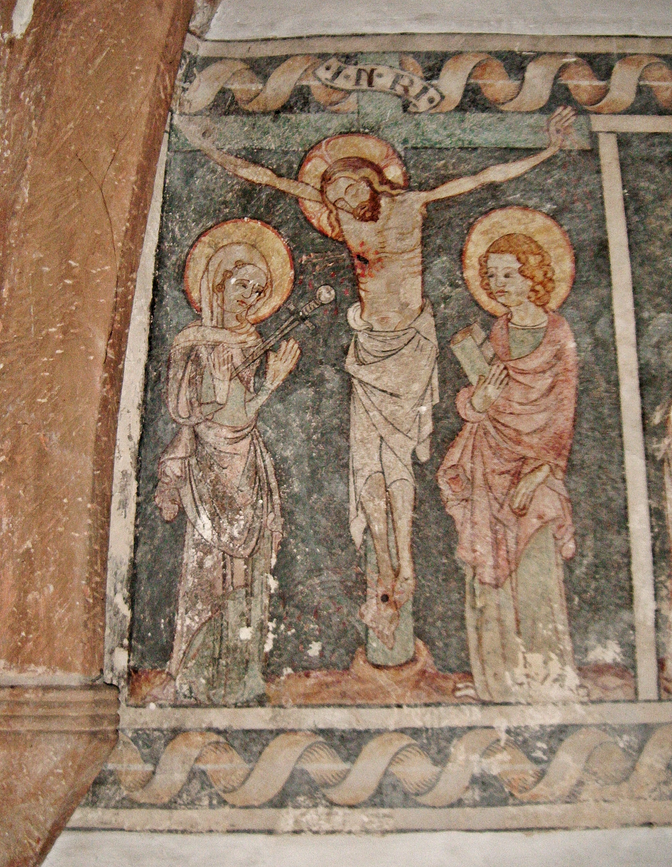 Katharinenkapelle Landau in der Pfalz, gotische Malerei